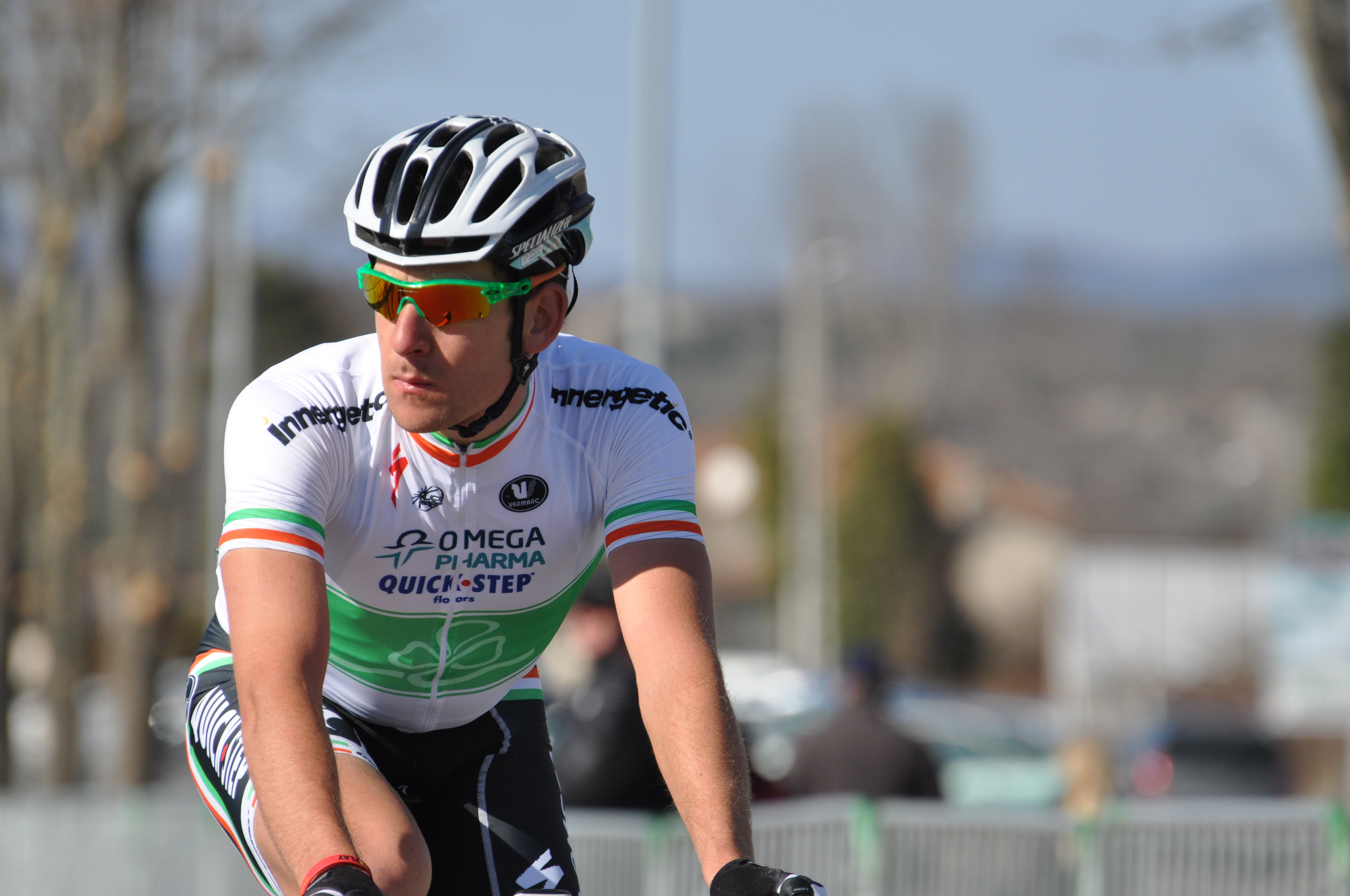 Boucles du Sud Ardèche-Souvenir Francis Delpech 2012.